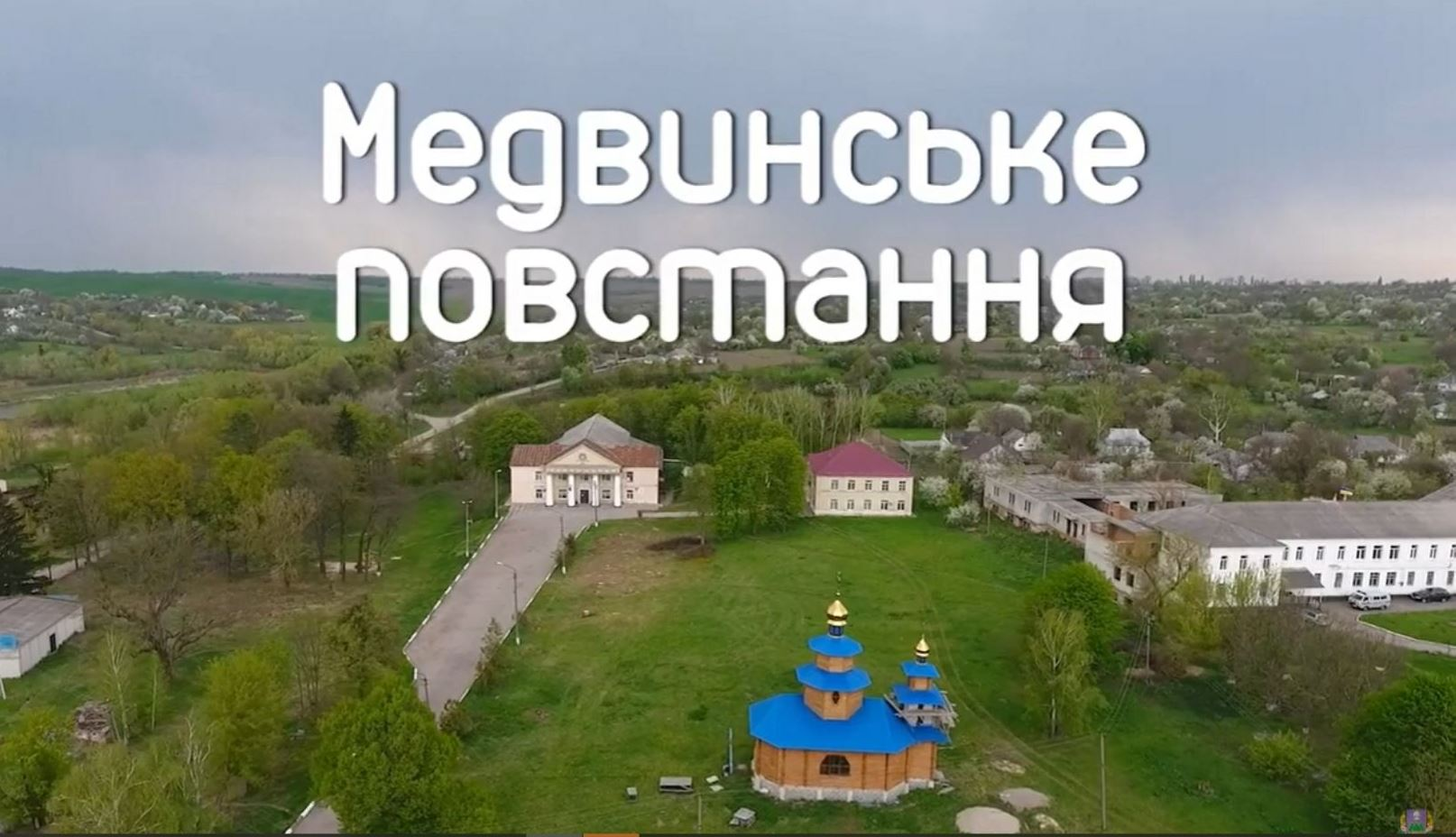 Кадр із фільму "Медвинське повстання"